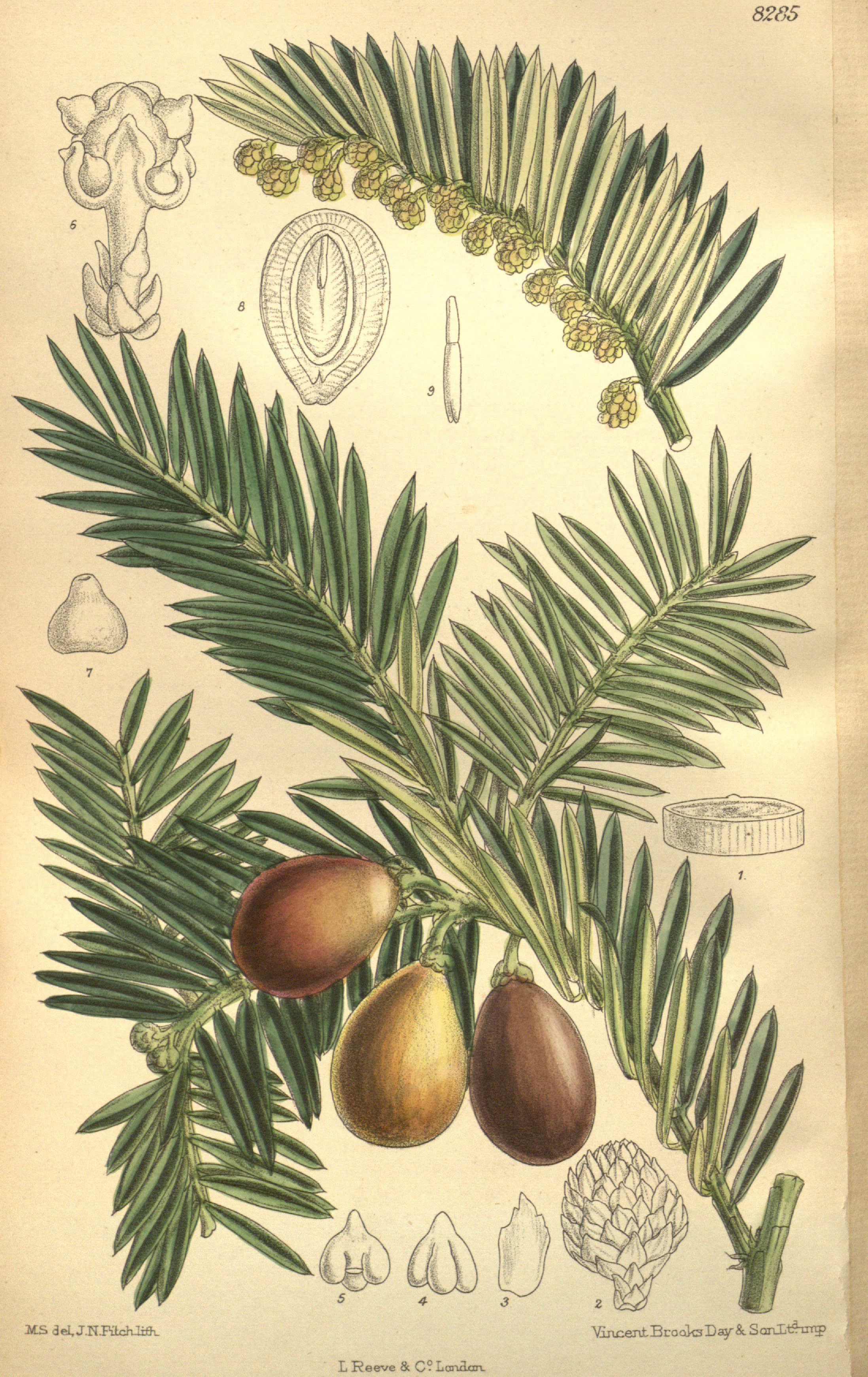 Cephalotaxus drupacea (= Cephalotaxus harringtonii), Cephalotaxaceae